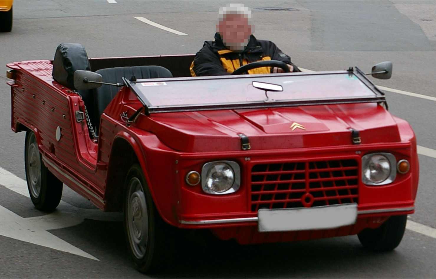 Citroen Mehari mit heruntergelegter Frontscheibe in Heidelberg